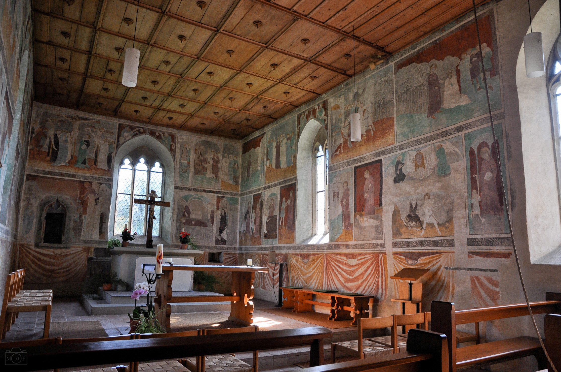 Landschlacht: Kapelle St. Leonhard, Münsterlingen TG Innenraum mit Fresken